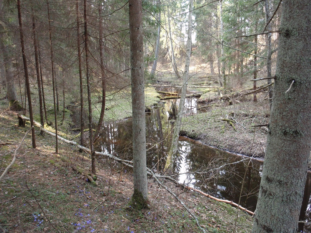 Hatiku oja